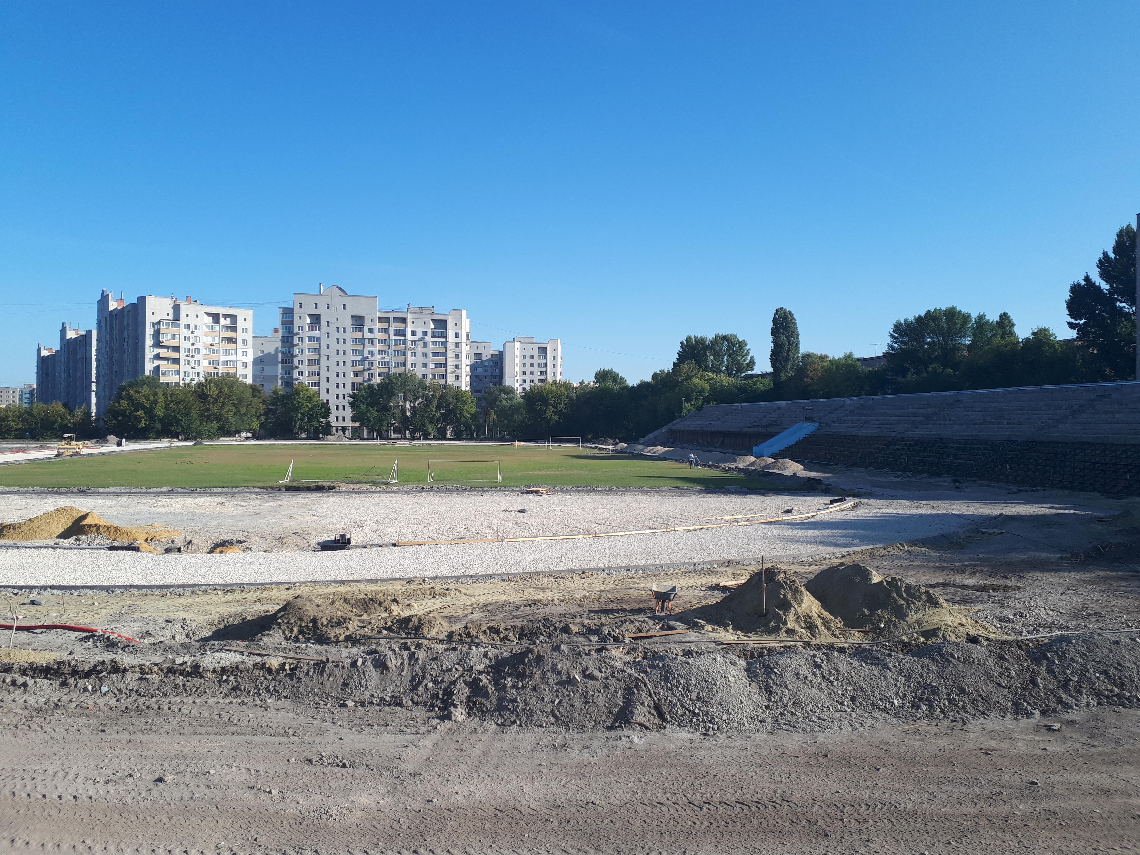 Первый этап реконструкции стадиона Волга. Фото сделано со стороны проспекта Энтузиастов.